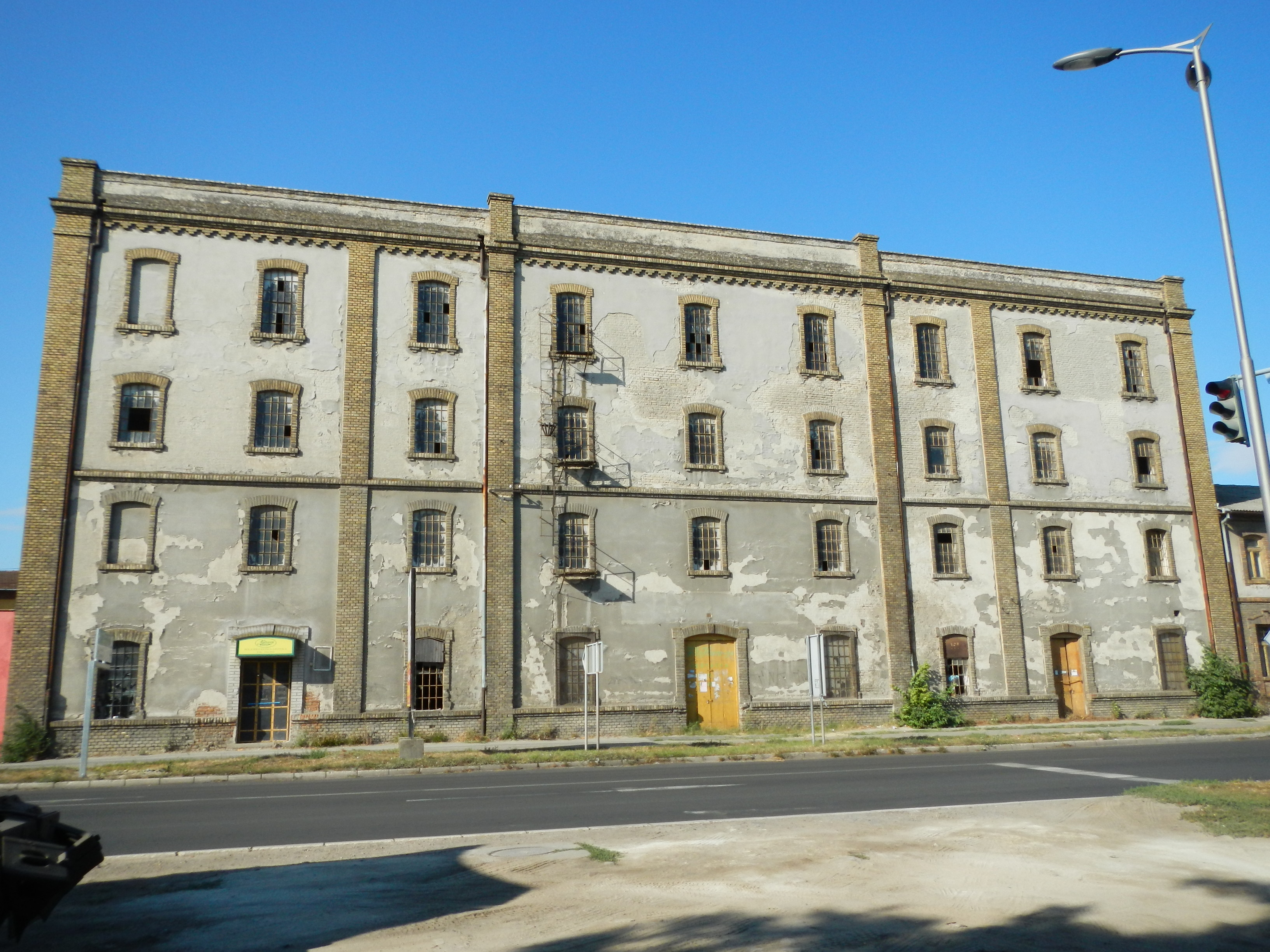 Највећи млин у Суботици подигнут је 1906. године у власништву Смоленски Габора и Муић Михаља. Током Другог светског рата млин носи име Викторија. Млин је један од ретких троспратних објеката настао почетком 20. века, чија фасада са мало декоративних елемената наглашава период модерне у архитектури.